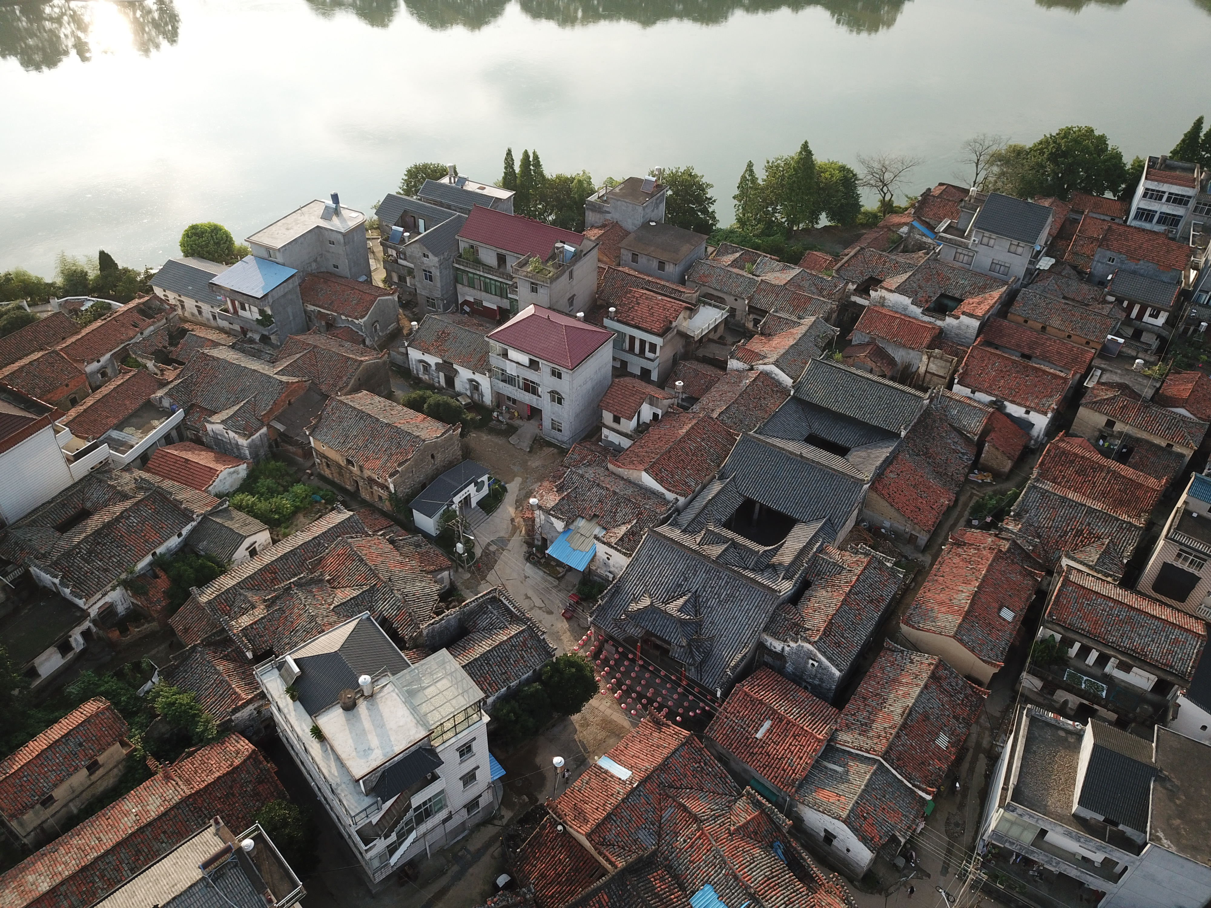 北淤蓝氏宗祠